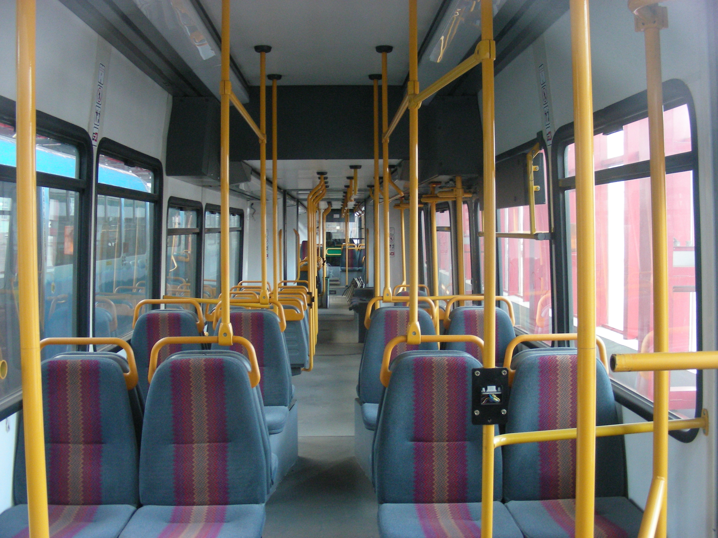 Interiér liberecké tramvaje RT6S (foto ve vozovně)